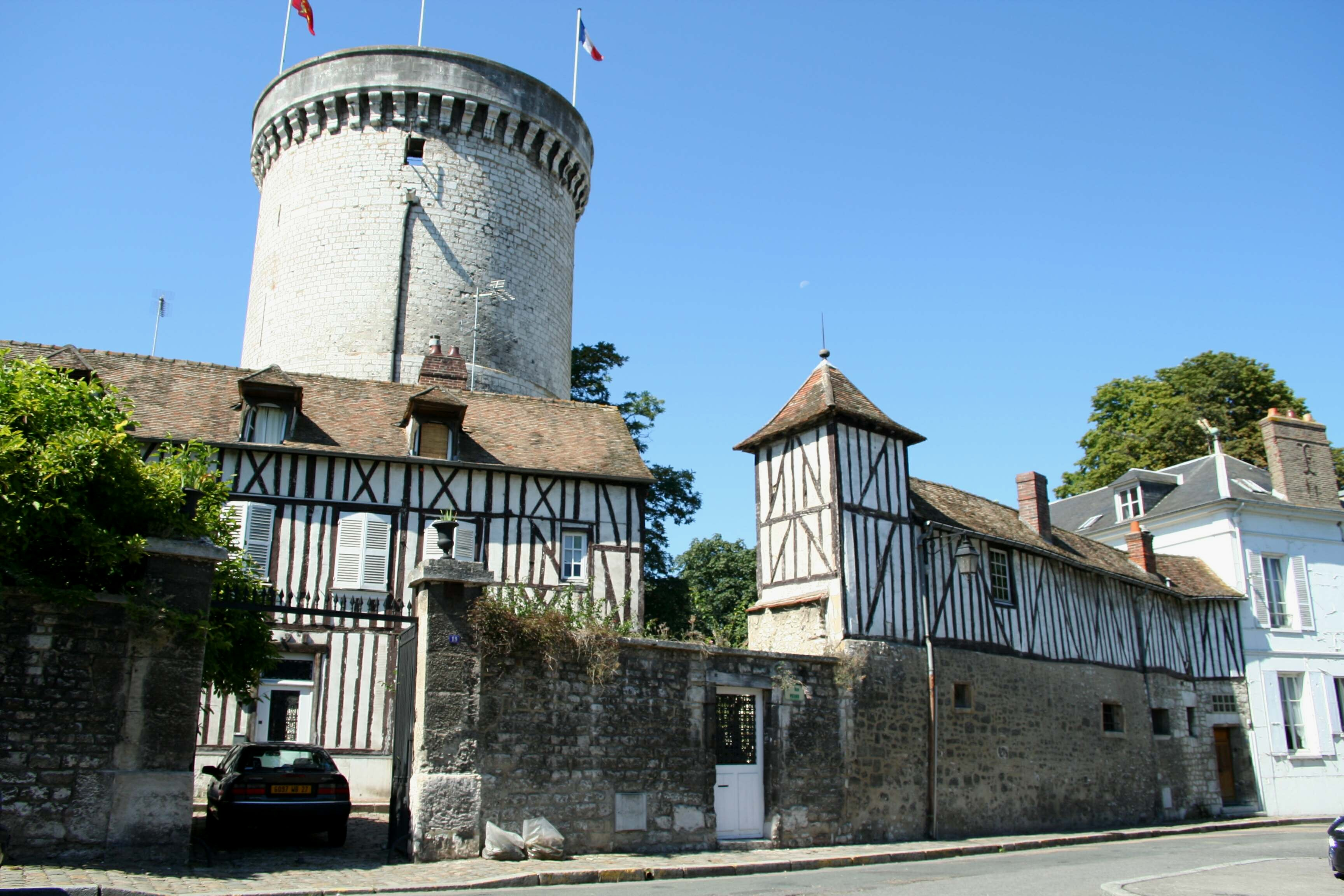 Tour des Archives à Vernon, Eure (France)